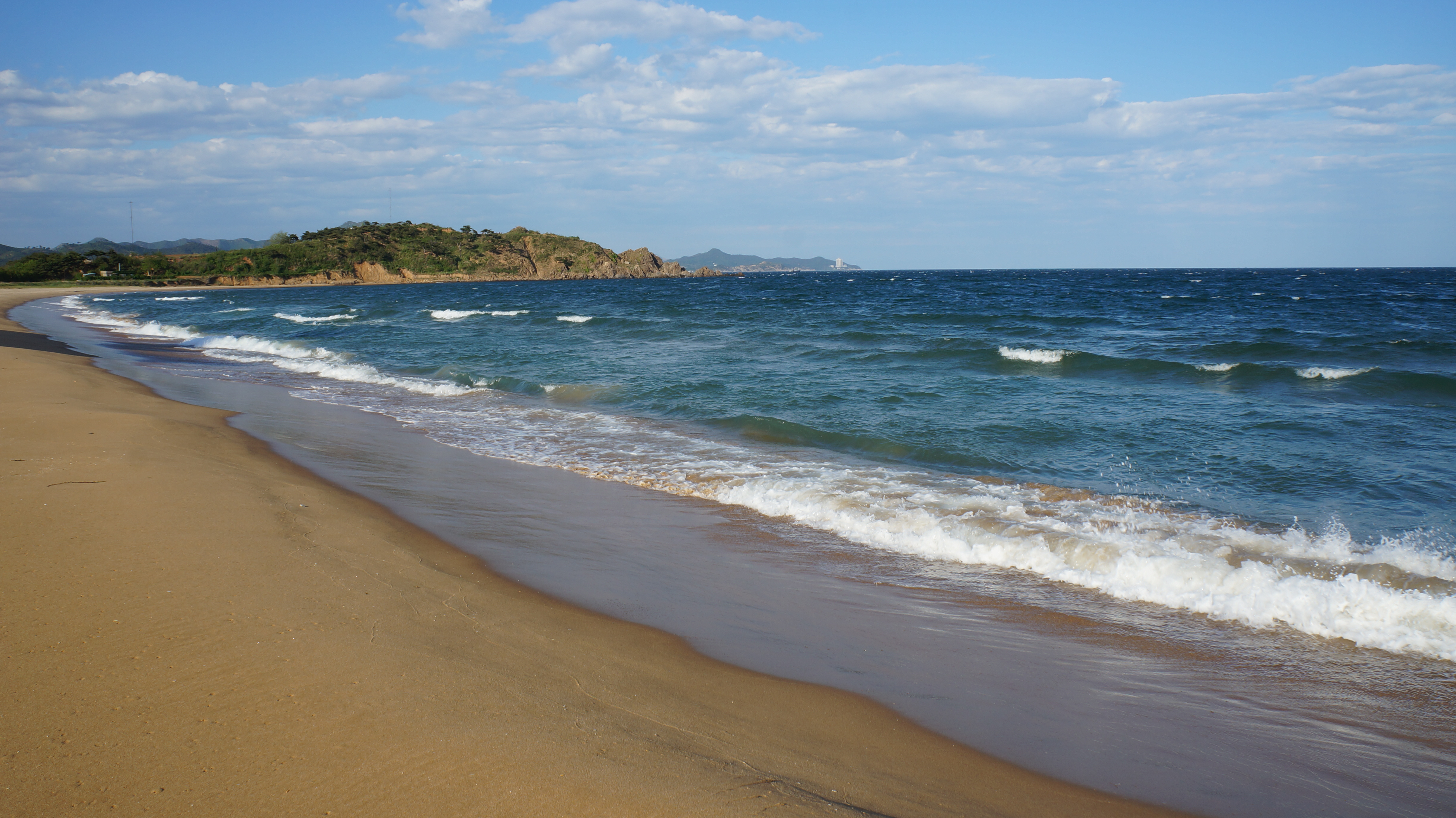 Hamhung Beach